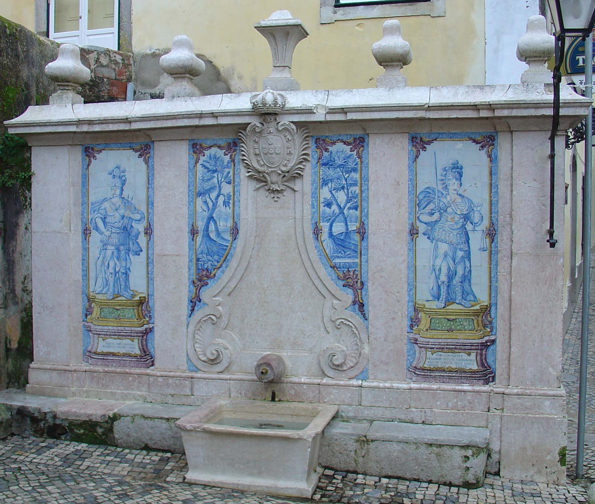 Fonte da Pipa - Sintra. Mandada reedificar e melhorada pelo Dr. Francisco José de Miranda Duarte em 1787. Fotografia de António Neves, 1 de Janeiro de 2007